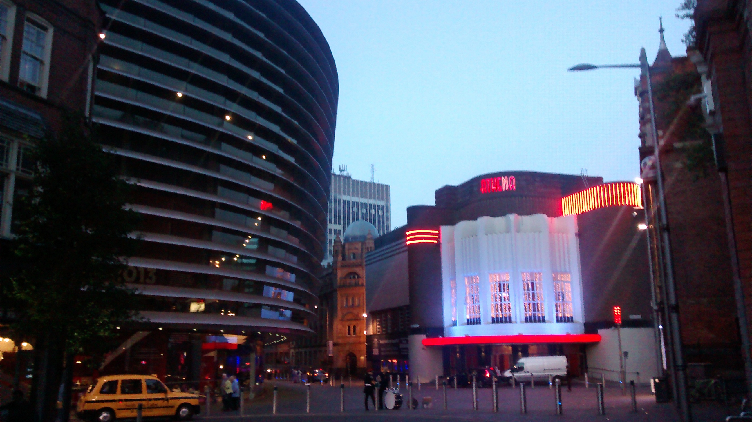 Po lewej Teatr Curve